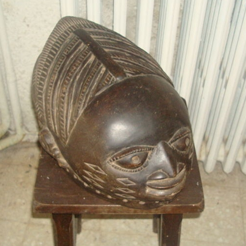 Mascara de Gelede Orossi